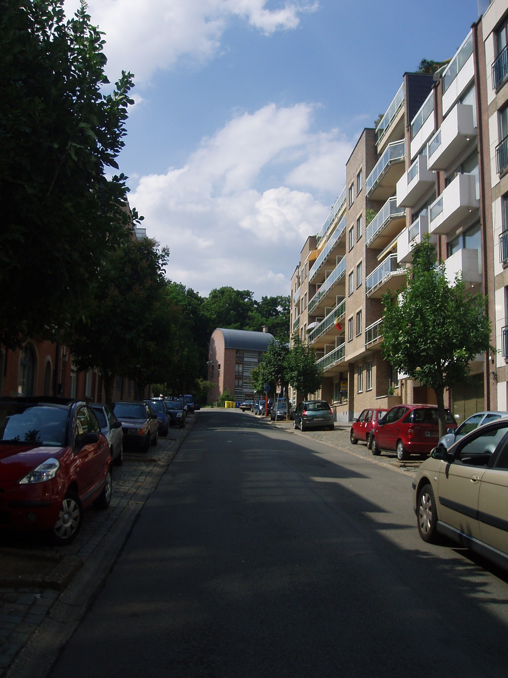 avenue Jules Genicot Auderghem Belgium